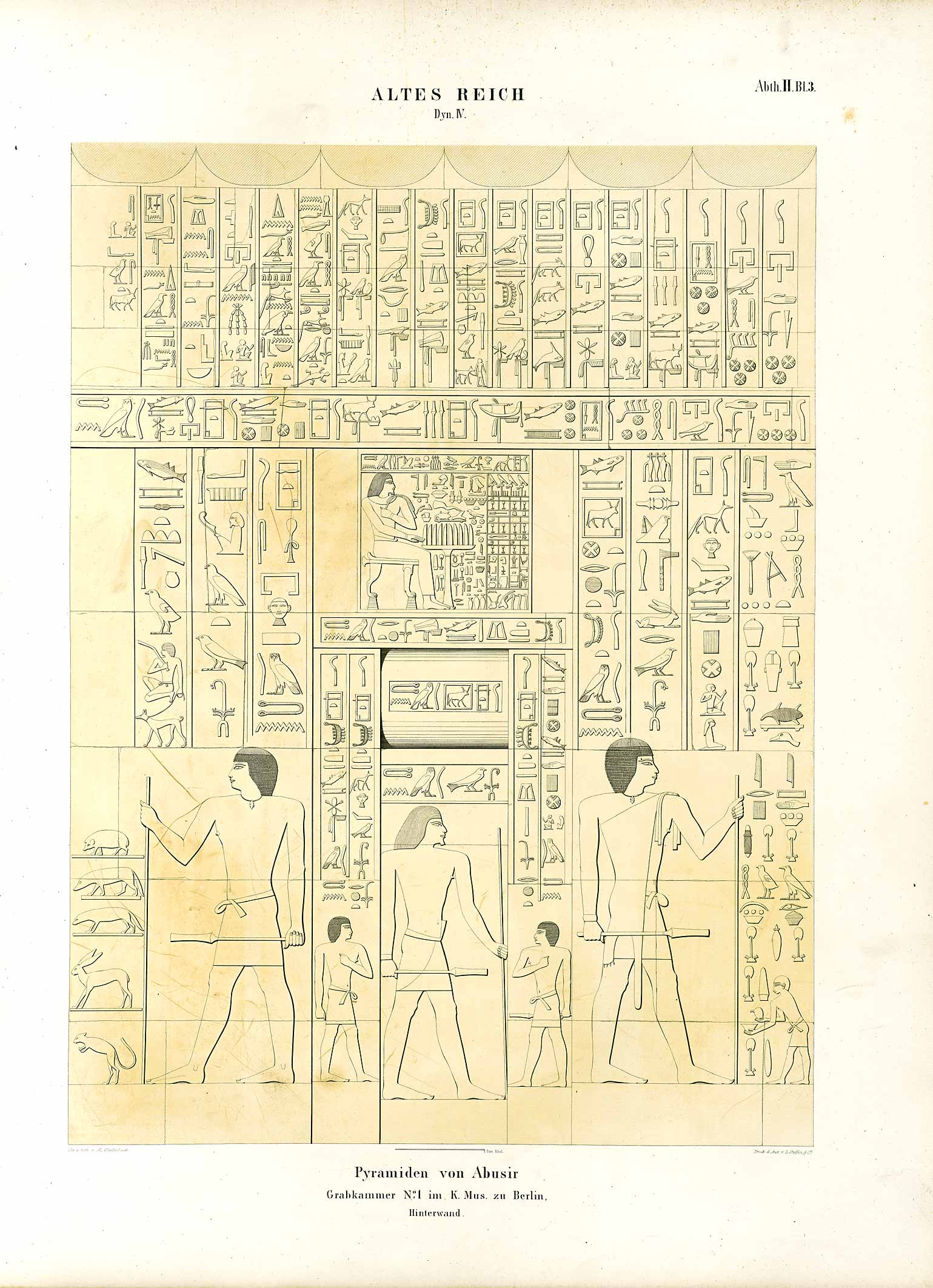 Die Scheintür aus dem Grab des Metjen aus Abusir, während der Lepsius-Expedition 1842-45 in Abusir entdeckt und nach Berlin gebracht, Berlin 1105